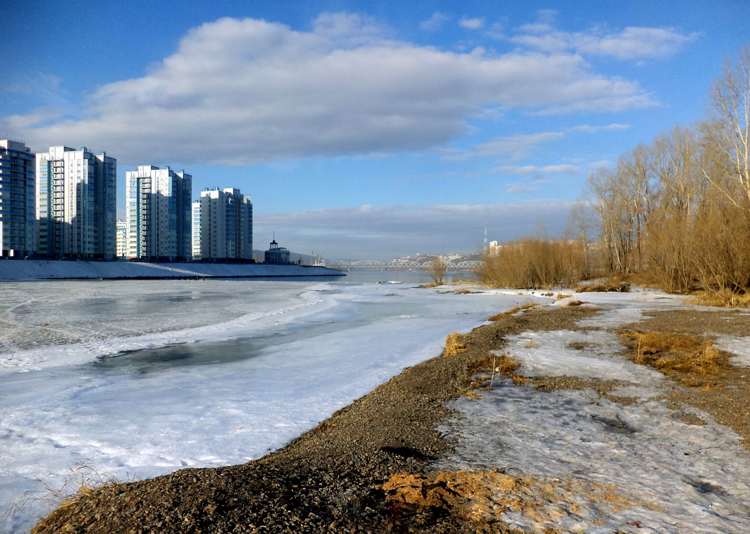 Tsentralnyy rayon, Krasnoyarsk, Krasnoyarskiy kray, Russia